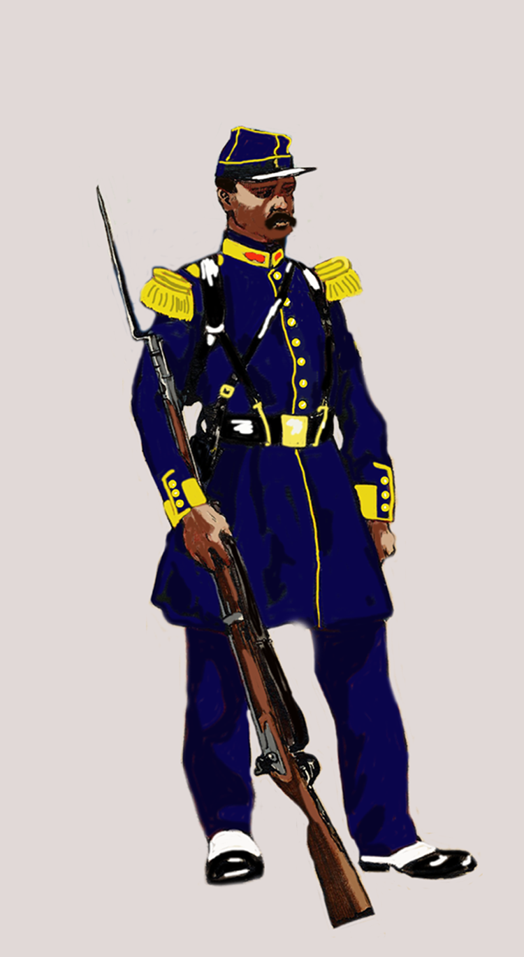 fantassin de l'infanterie légère de 1854